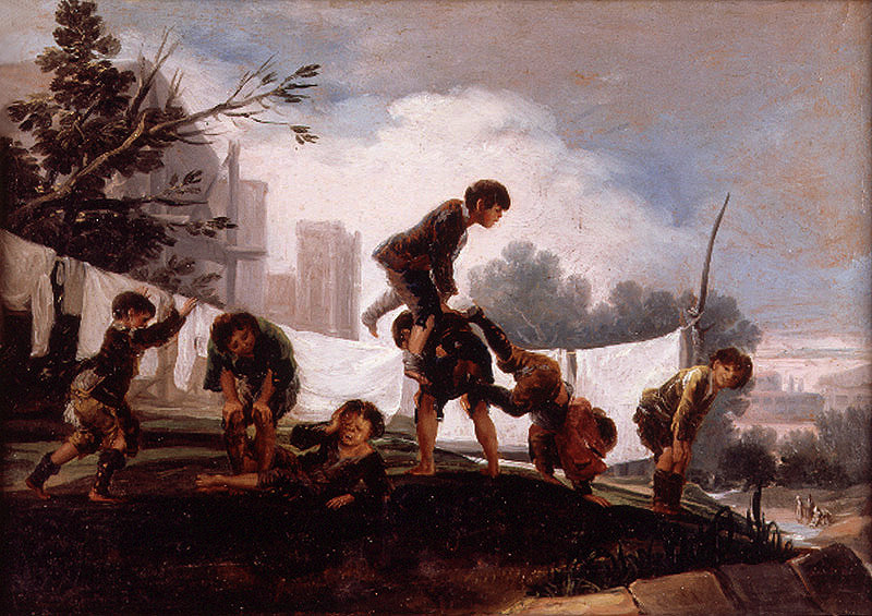 Serie Cartones para tapices.